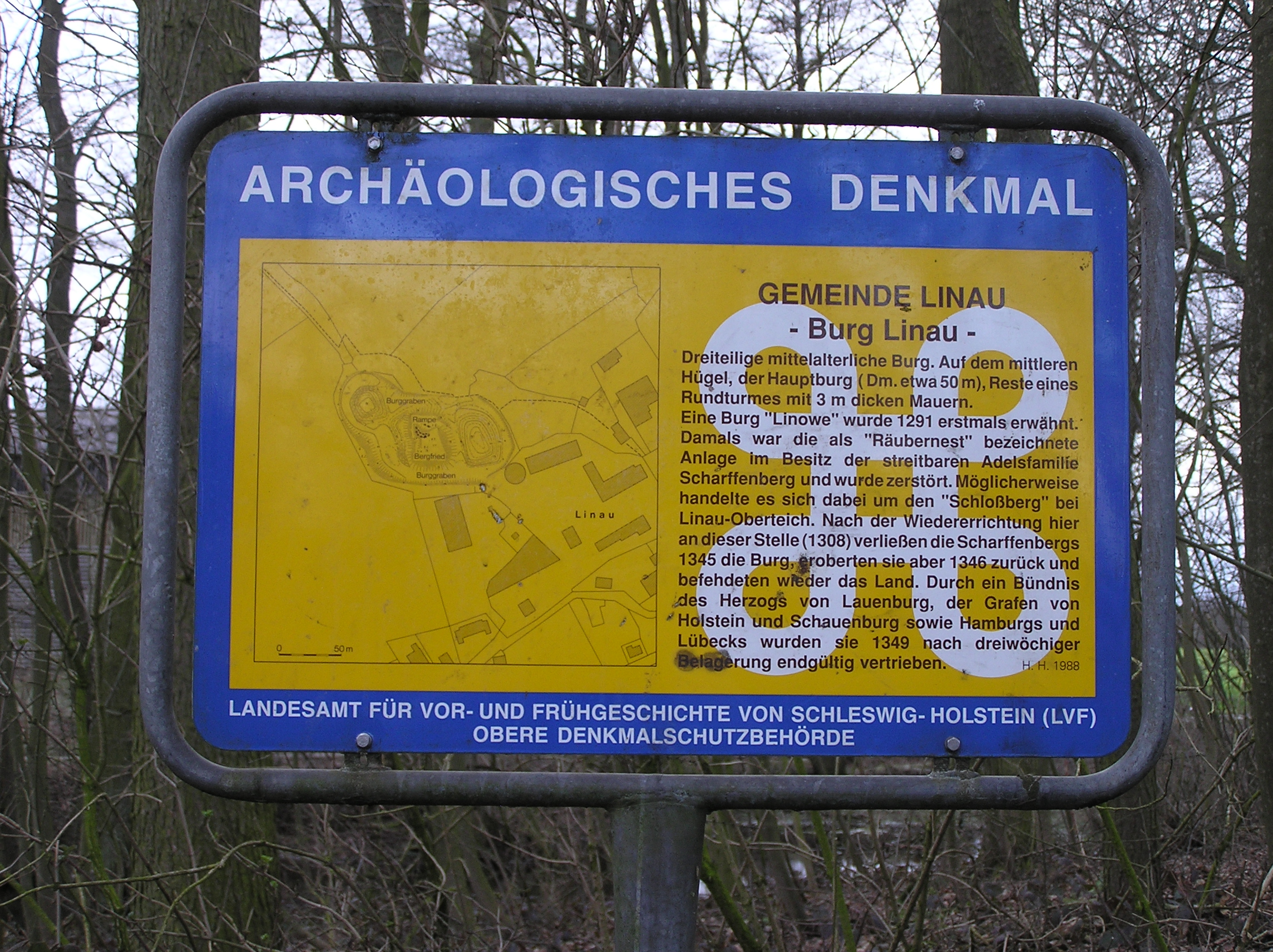 Schild des Landeamt für Früh- und Vorgeschichte von Schleswig-Holstein bei der "Burg Linau"